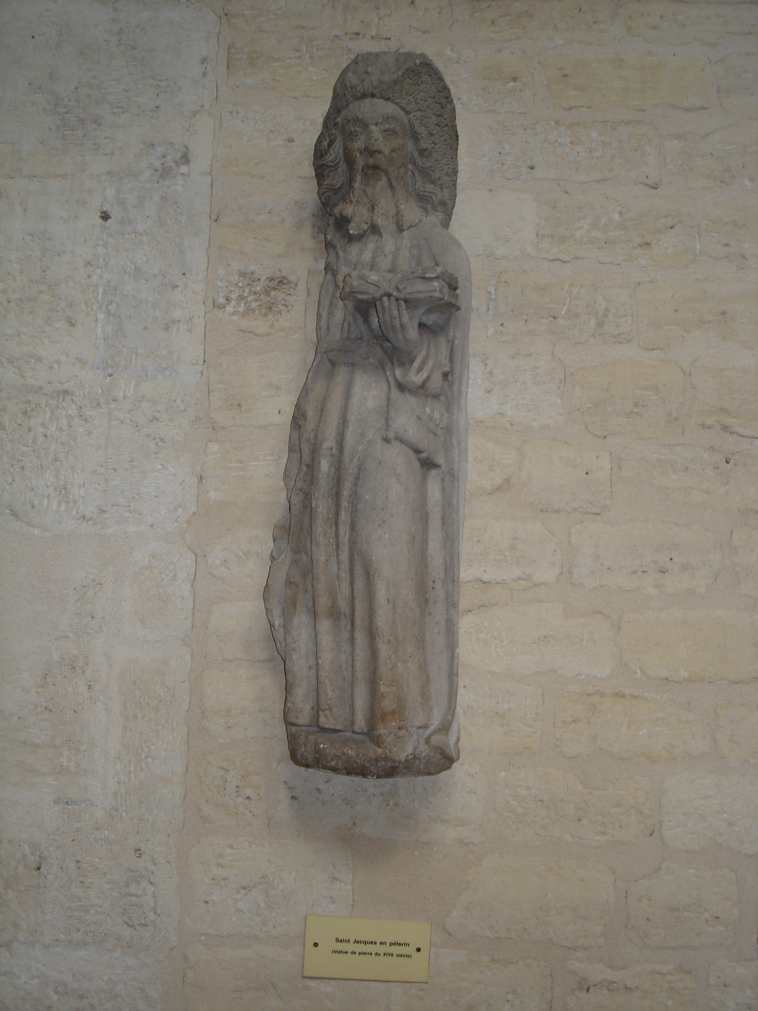 Church:Saint-Jacques-du-Haut-Pas (rue saint-Jacques - Paris Ve arrondissement). Stone statue of Saint-Jacques as pilgrin. (14 century)